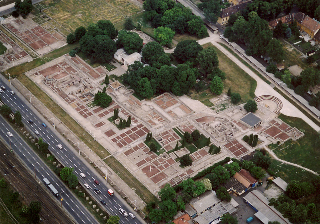 Aquincum - Óbuda - Hungary - Europe